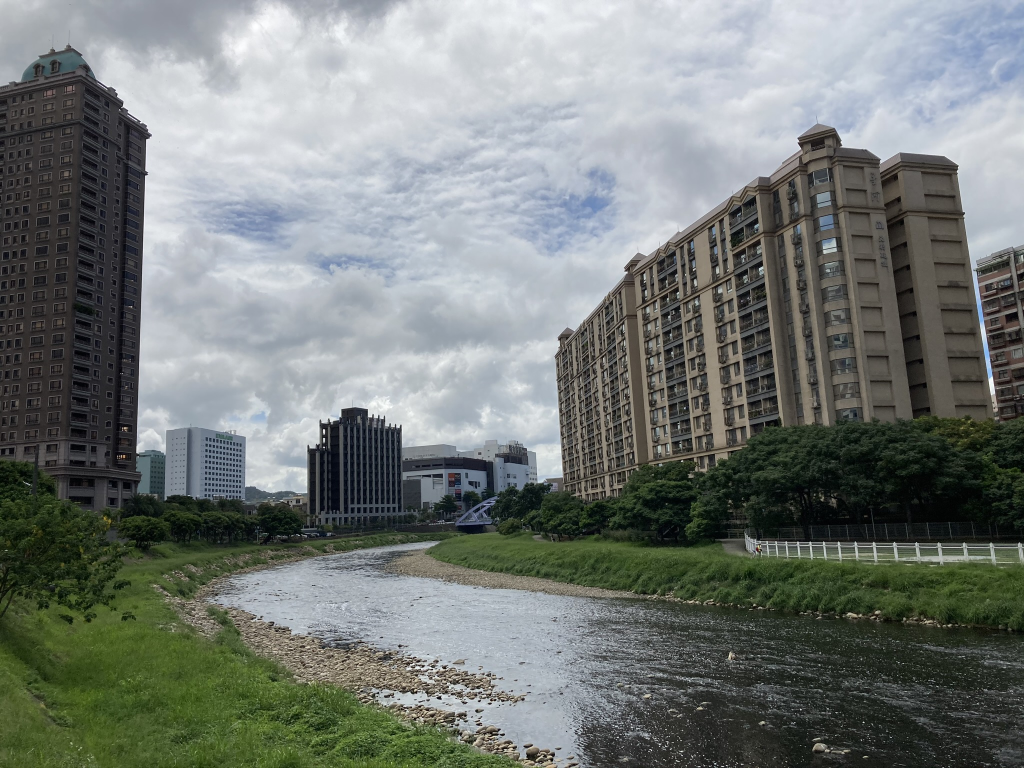 中文（台灣）: 流經南崁的南崁溪